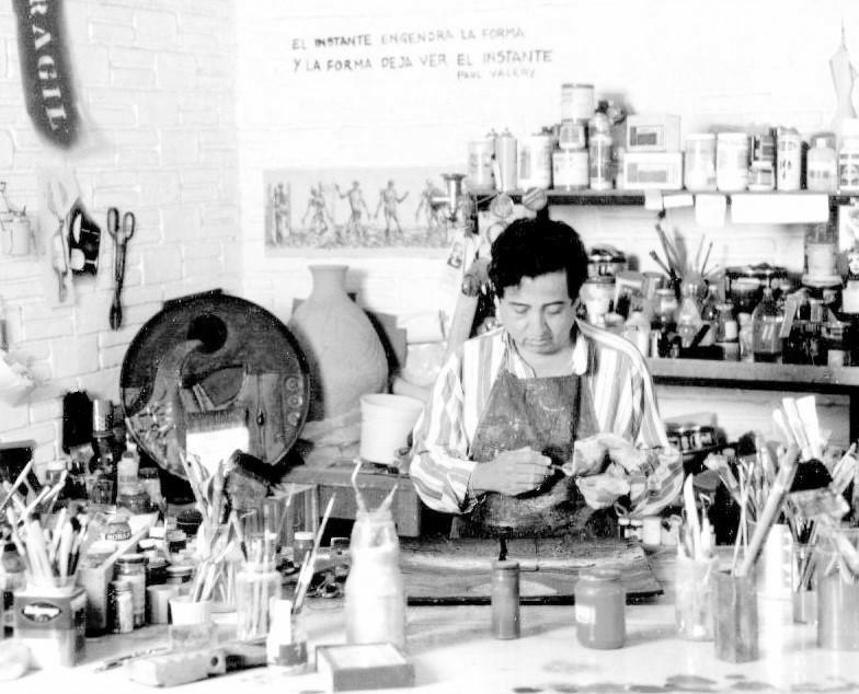 Conrado Domínguez